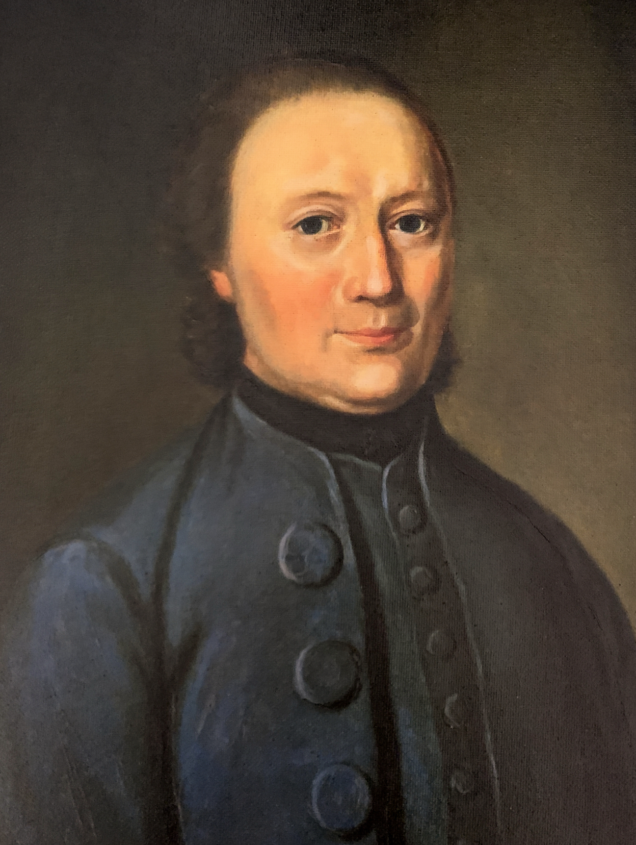 Porträtgemälde von Johann Helmann Jung